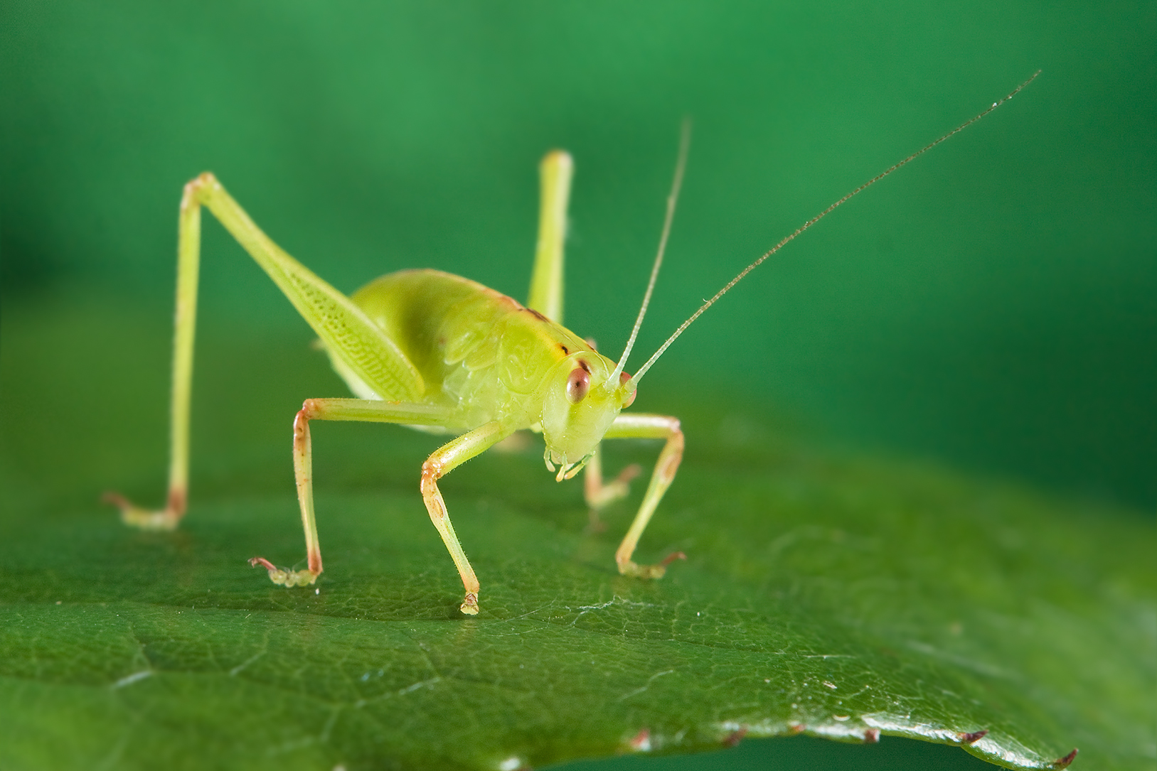 1.2 only